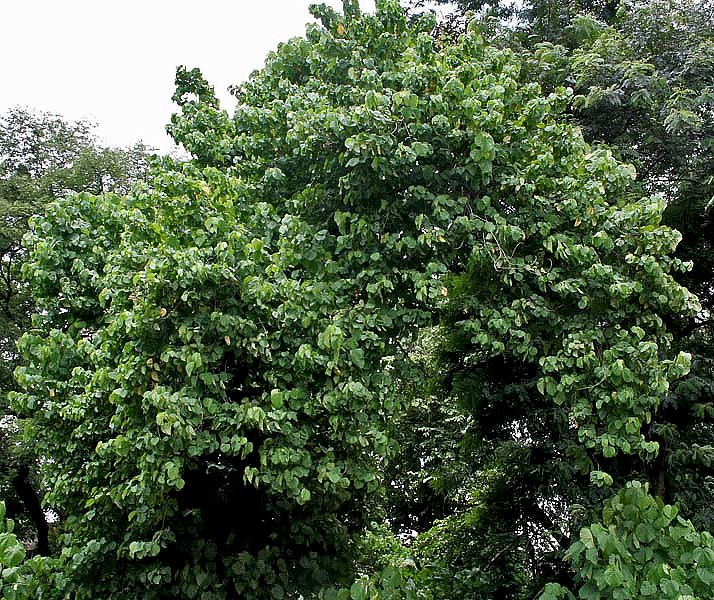 Bola Kleinhovia hospita in Kolkata, West Bengal, India.